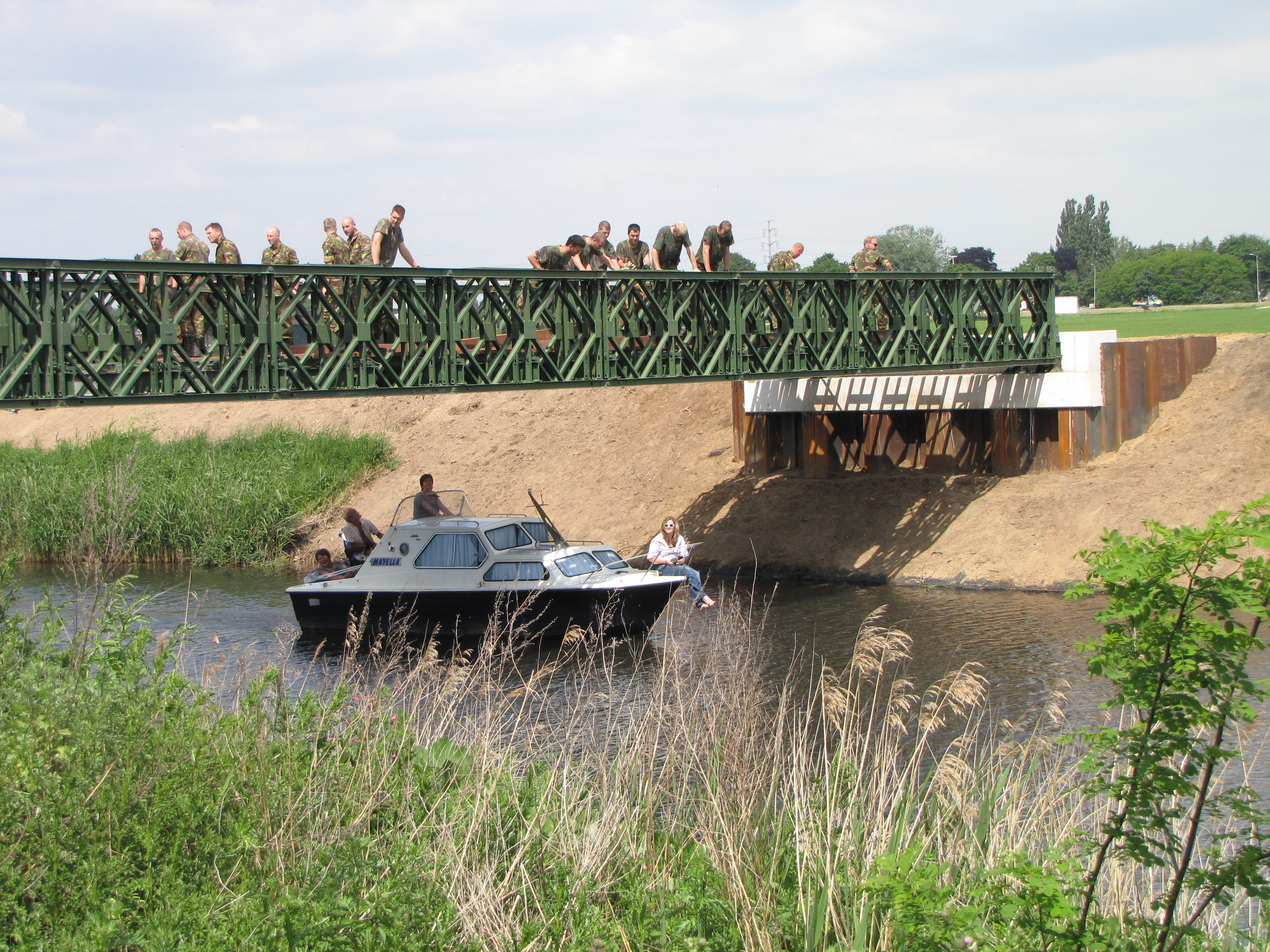 Bailybrug DRU.